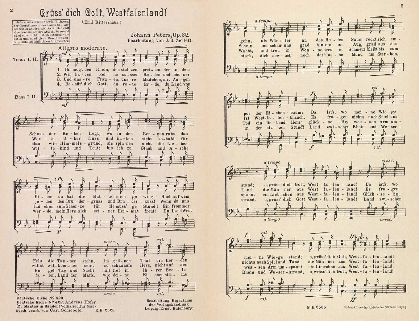 Westfalenlied von Emil Rittershaus und Johann Peters